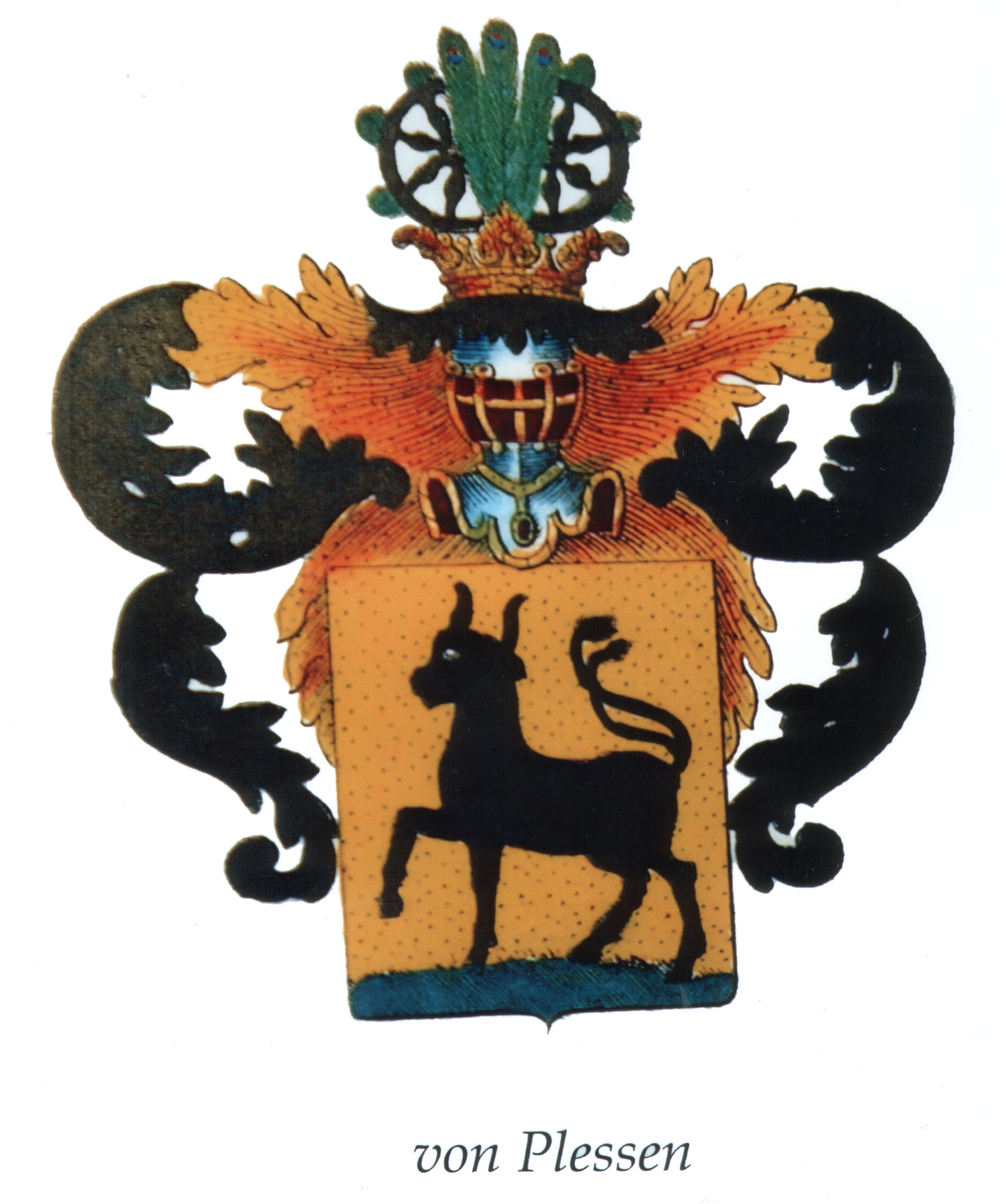 Quelle: siehe u.a. Lexikon Mecklenburg Vorpommern; Hinstorff Verlag Urheber: nicht bekannt Datum: weit vor 1800 wurde dieses Wappen erstellt Anmerkungen: Scan von einem Bild meiner heimatvertriebenen Plessenmutter Diese Datei oder Bestandteile davon stellen eine Flagge, ein Wappen, ein Siegel oder ein anderes Hoheitszeichen dar. Auch wenn diese Datei unter einer freien Lizenz steht oder nicht urheberrechtlich geschützt ist, kann ihre Verwendung gegebenenfalls durch andere rechtliche Bestimmungen außerhalb des Urheberrechts eingeschränkt sein.